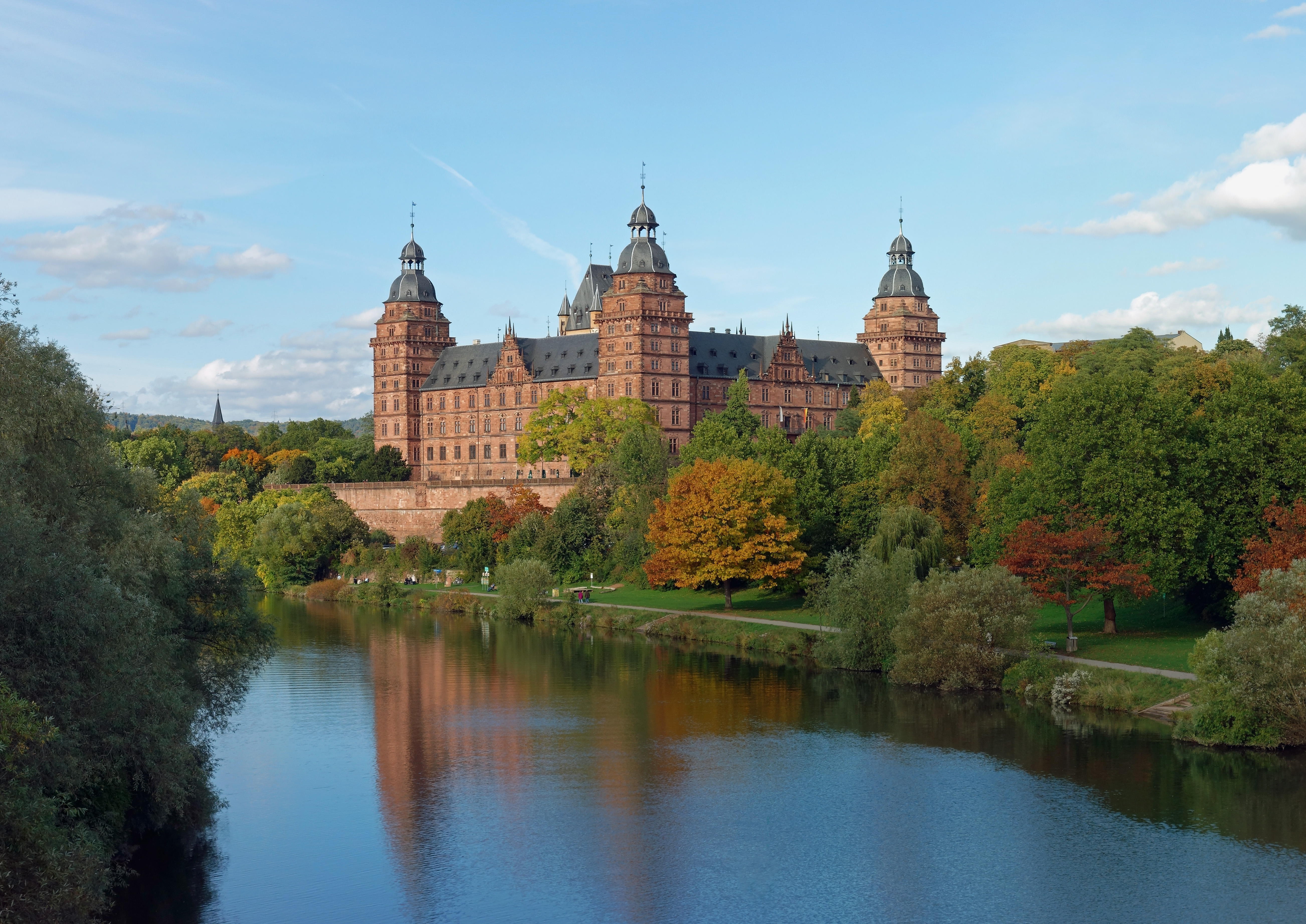 Aschaffenburger Schloss